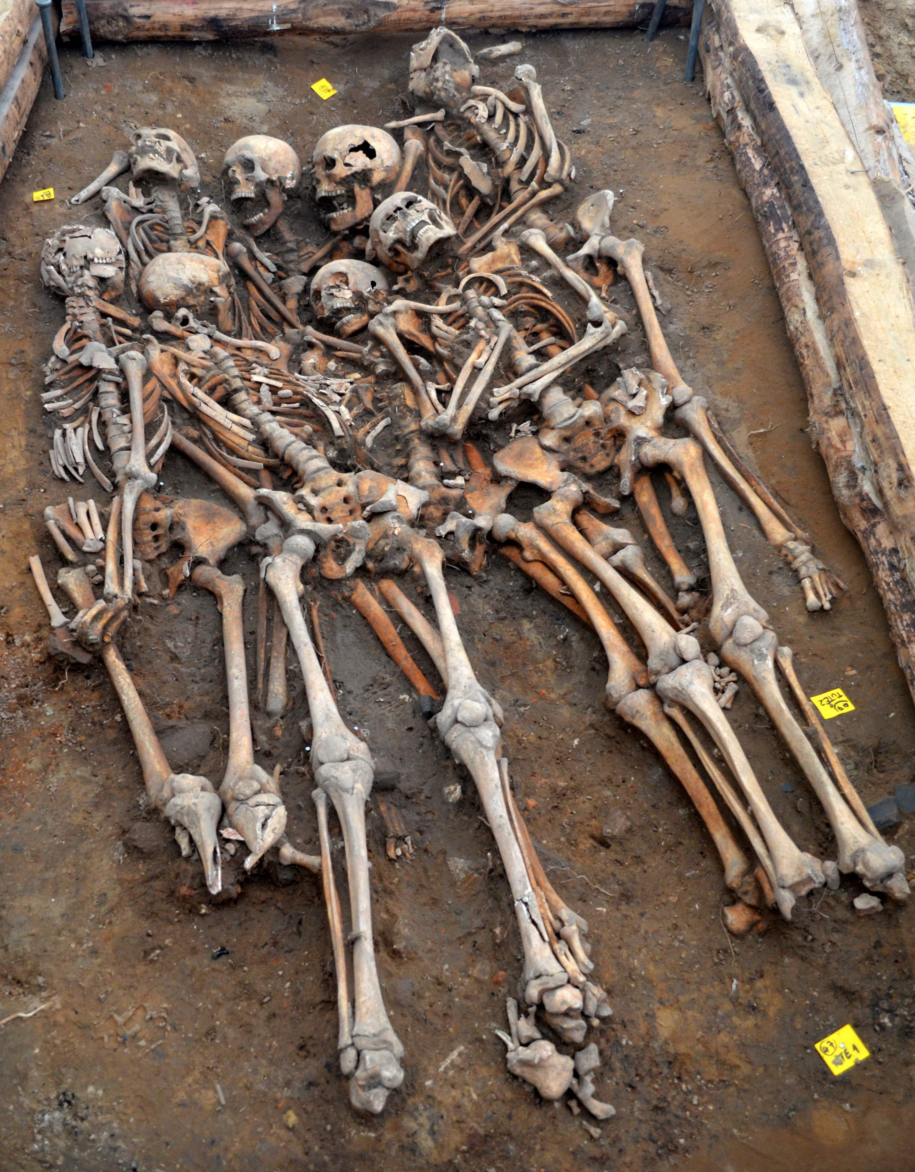 Braunschweig, Gelände des Georg-Eckert-Instituts, ehemalige Villa von Bülow: Bei Aushubarbeiten Anfang 2019 auf dem Instituts-Gelände (Teil des ehemaligen Friedhofs des Kreuzklosters) gefundenes Massengrab mit acht Skeletten.